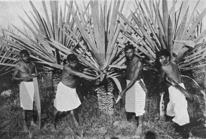 Indígenas mayas yucatecos cosechando henequén